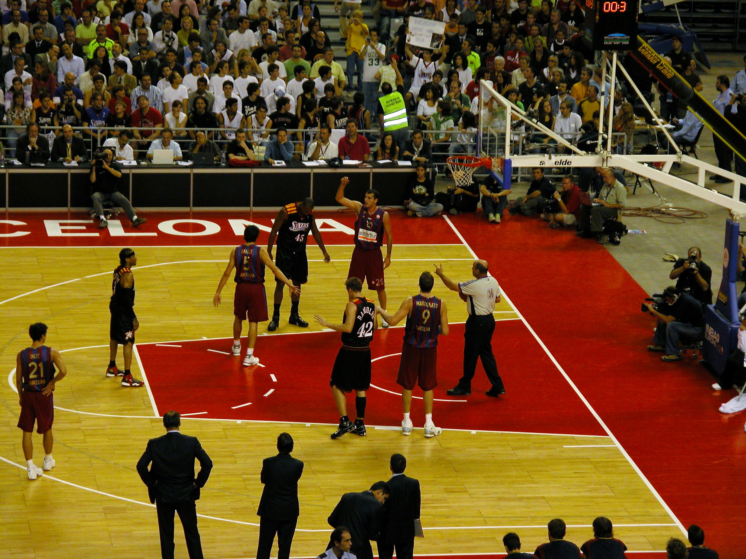 Allen Iverson realizando un tiro libre a canasta, el 5 de octubre de 2006, frente al FC Barcelona en el Palau Sant Jordi